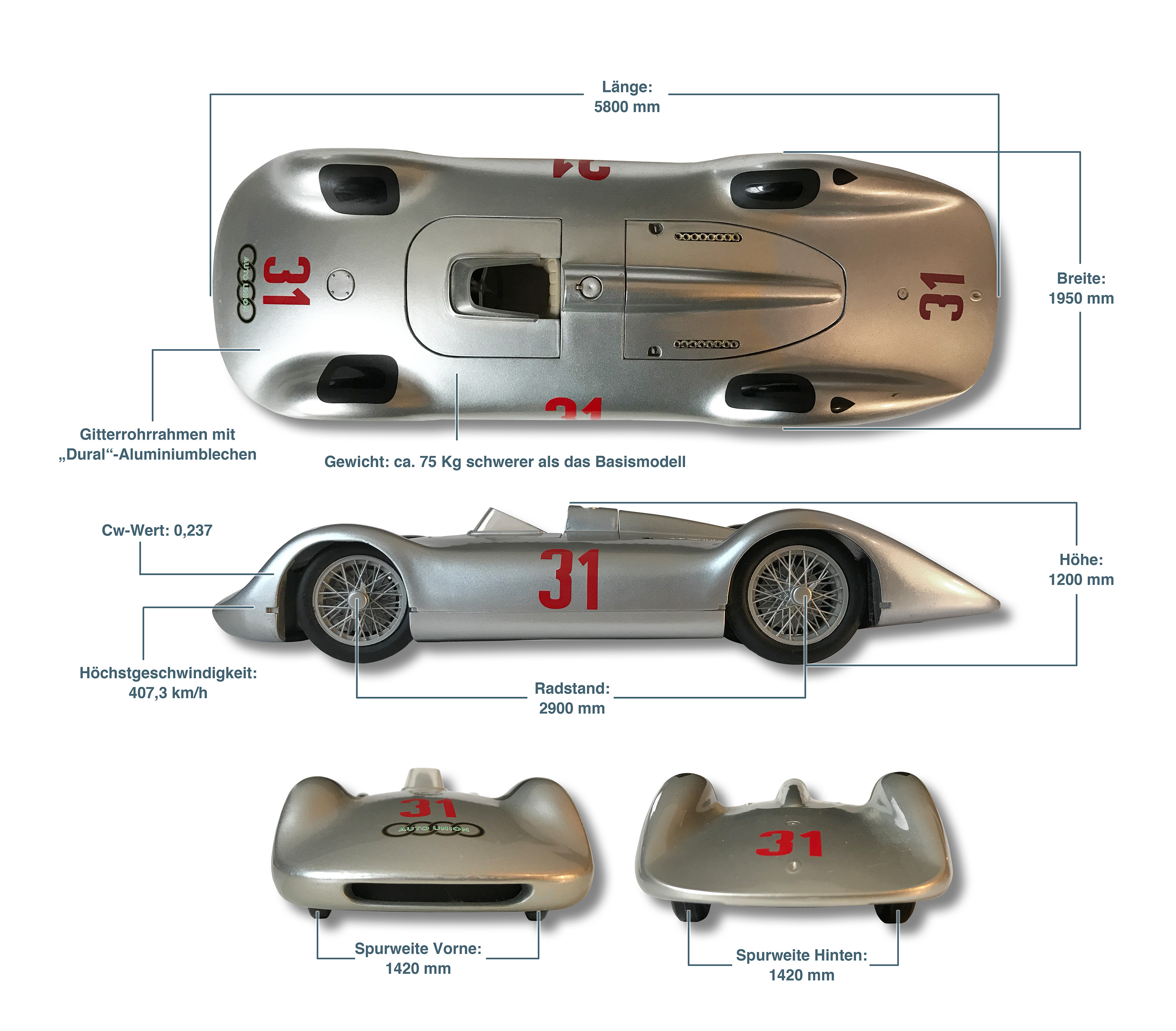 Grafisch aufbereitete Basis-Informationen zum Auto-Union-Rennwagen Typ C (Stromlinie)